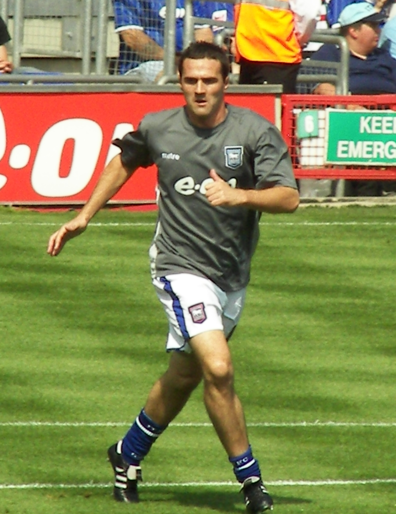 Tommy Miller